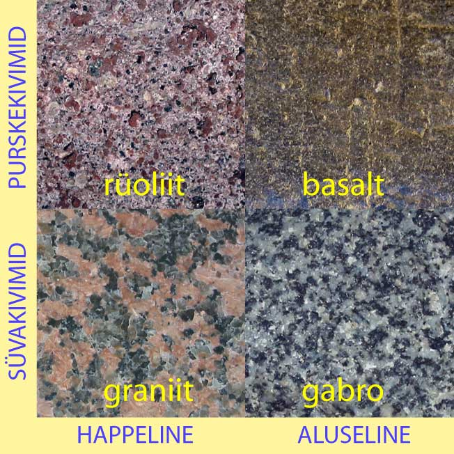 Tardkivimite diagramm